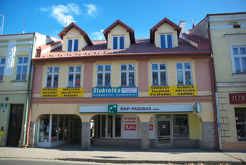 Jagiellońska 7 Sanok